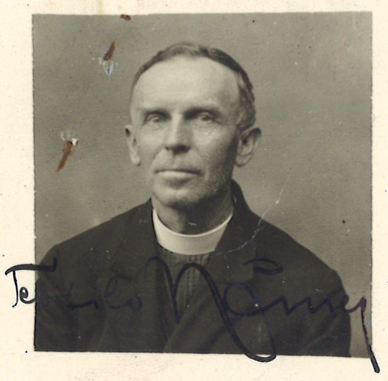 Priest Bohumil Nemec